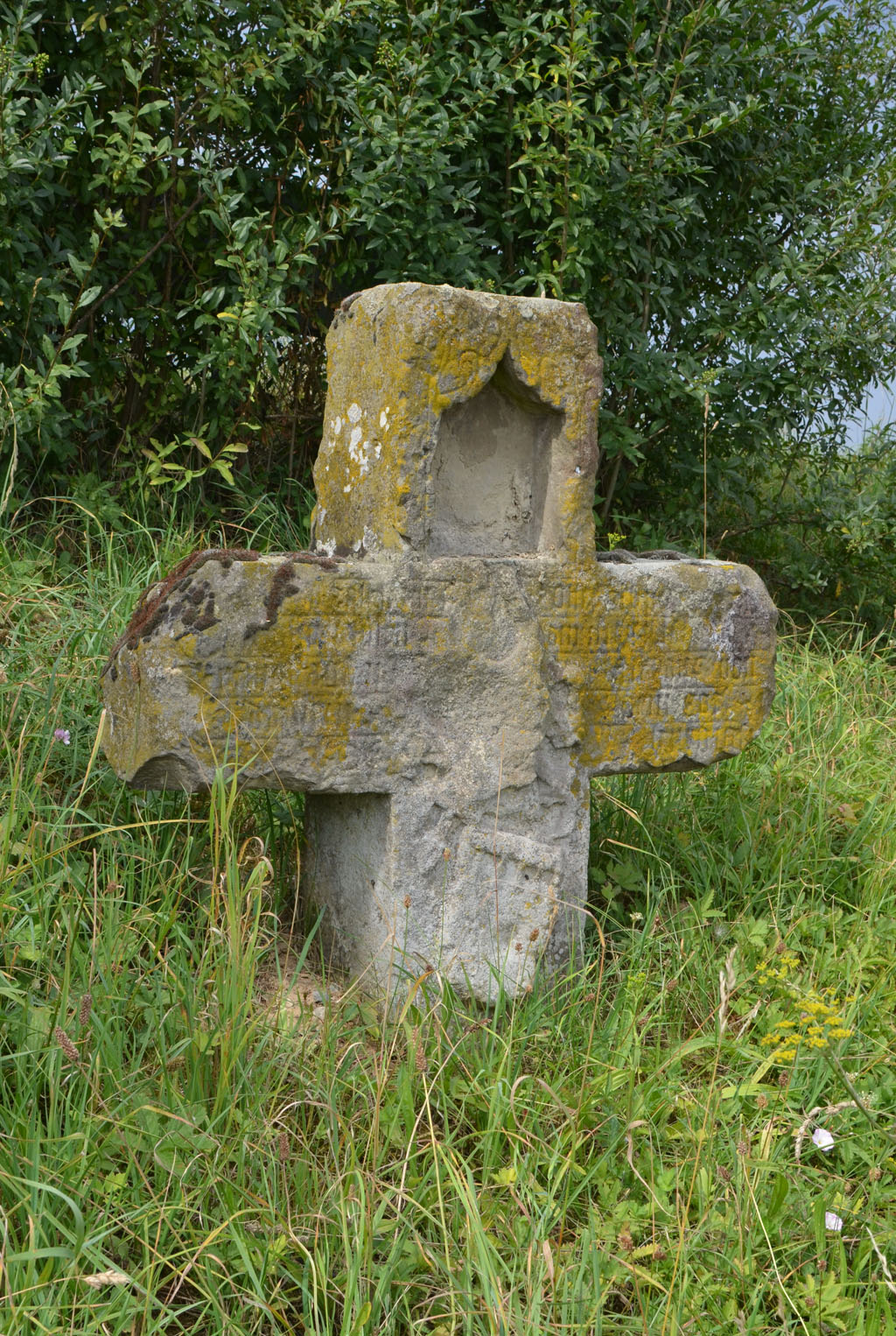 2. Gedenkkreuz von 1534 in Lauffen am Neckar an der Landstraße nach Nordheim.